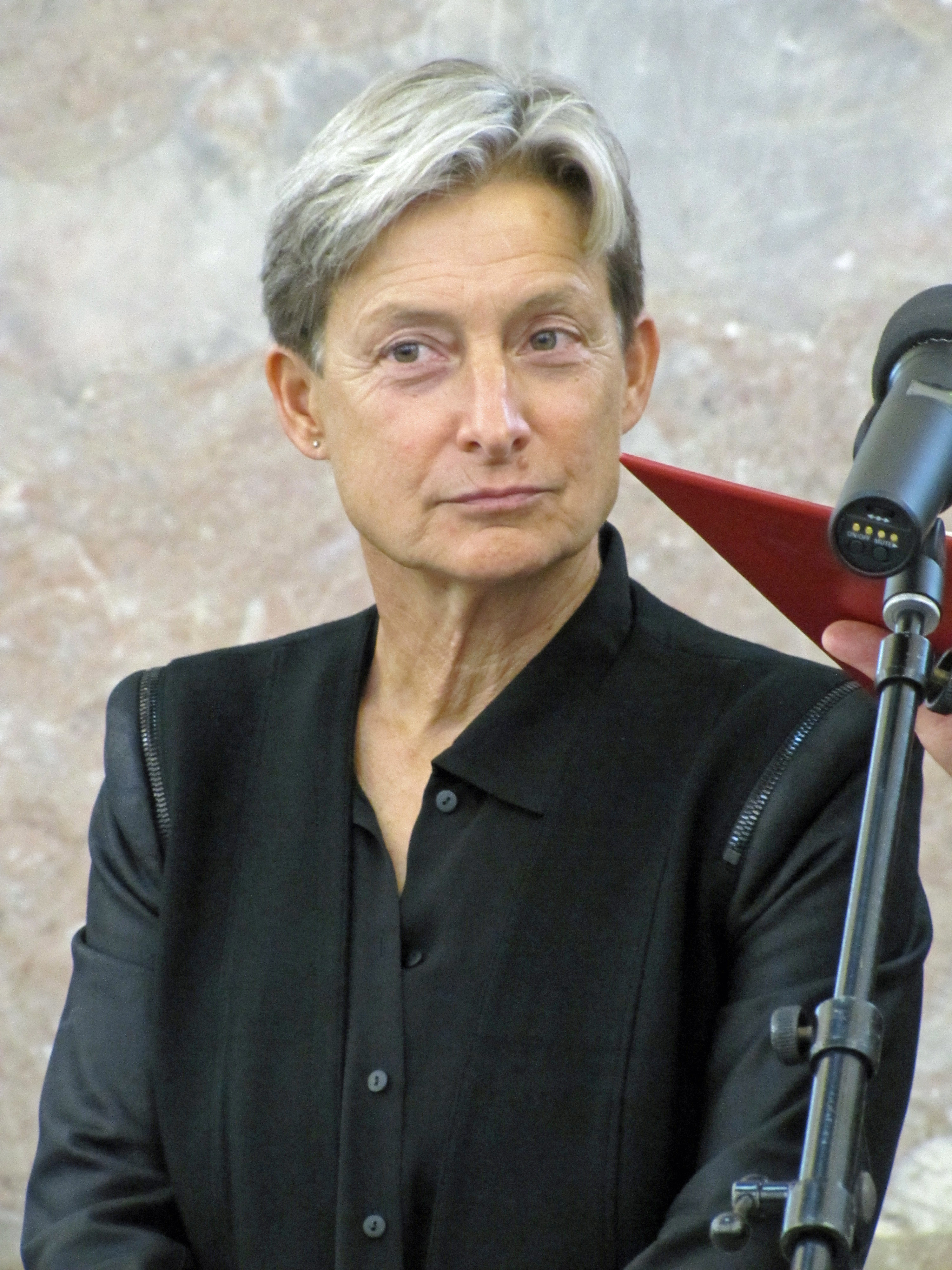 Adorno-Preis 2012. Judith Butler, in der Frankfurter Paulskirche.